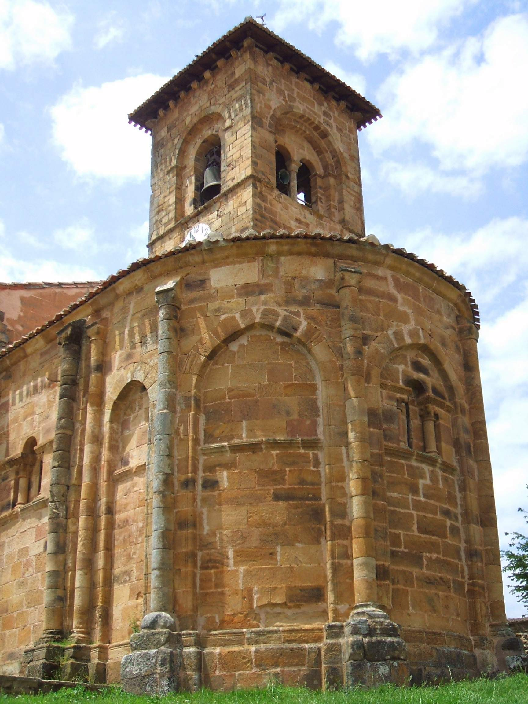 Riocavado de la Sierra (Burgos) - Iglesia de Santa Columba